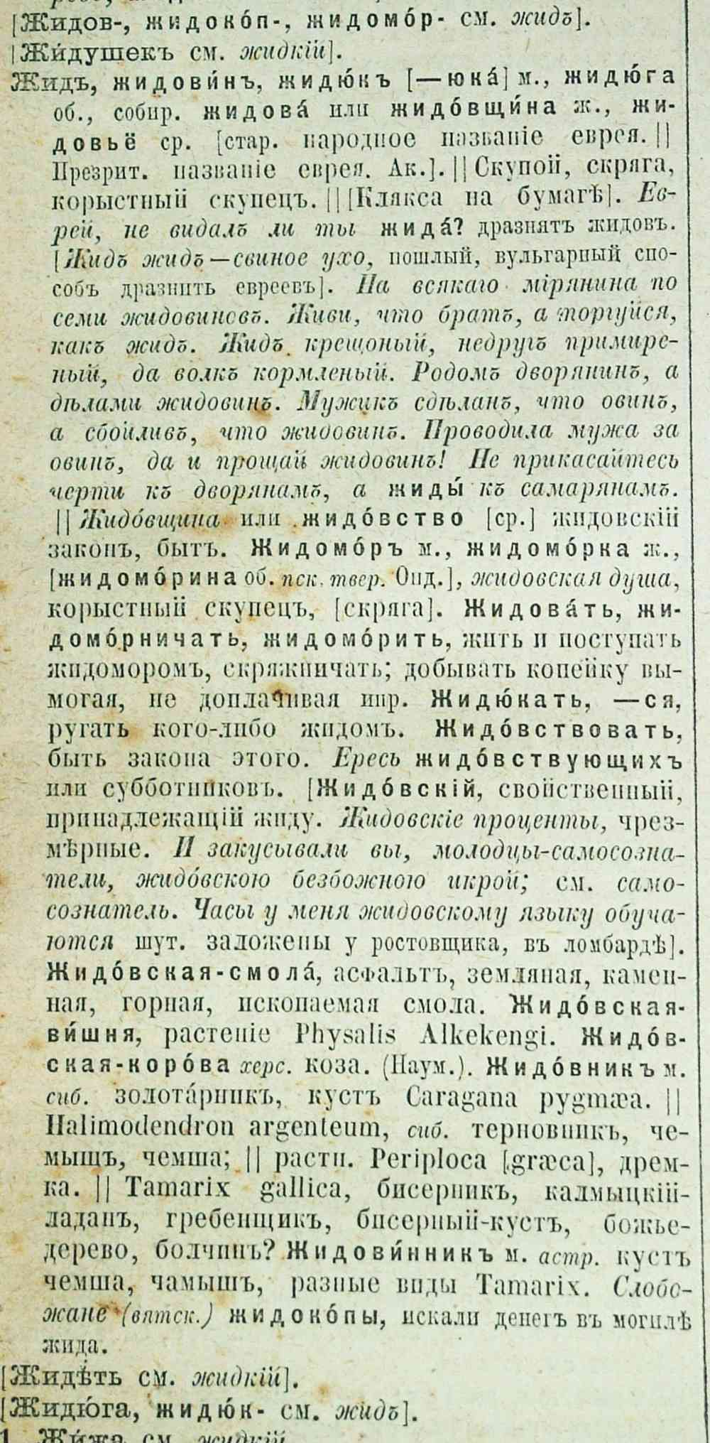 Страница со статьей «Жидъ» из «Толкового словаря живого великорусского языка» В.И. Даля. Издание 4-е (1912—1914), под ред. И.А. Бодуэна де Куртенэ.